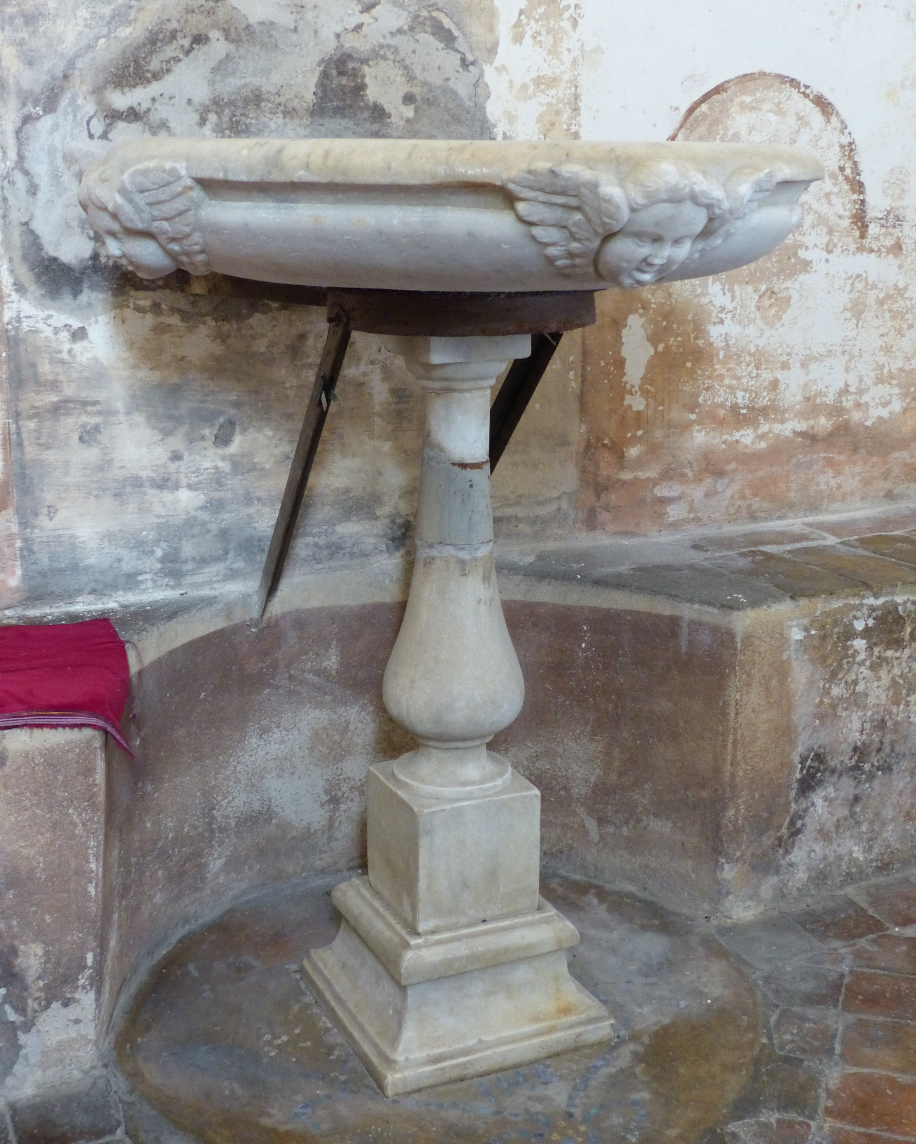 Haut-de-Cagnes (Cagnes-sur-Mer, Alpes-Maritimes, France), chapelle Notre-Dame-de-Protection; fonts baptismaux en marbre, la vasque portant trois têtes d'angelots aux ailes déployées, le pied étant en forme de balustre.